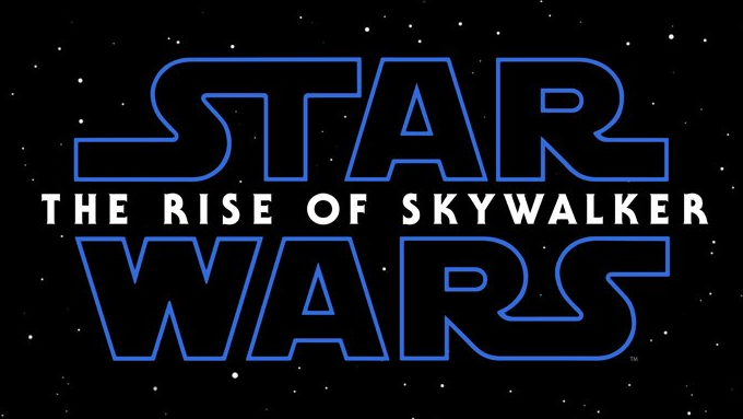 Logo du film Star Wars, épisode IX.